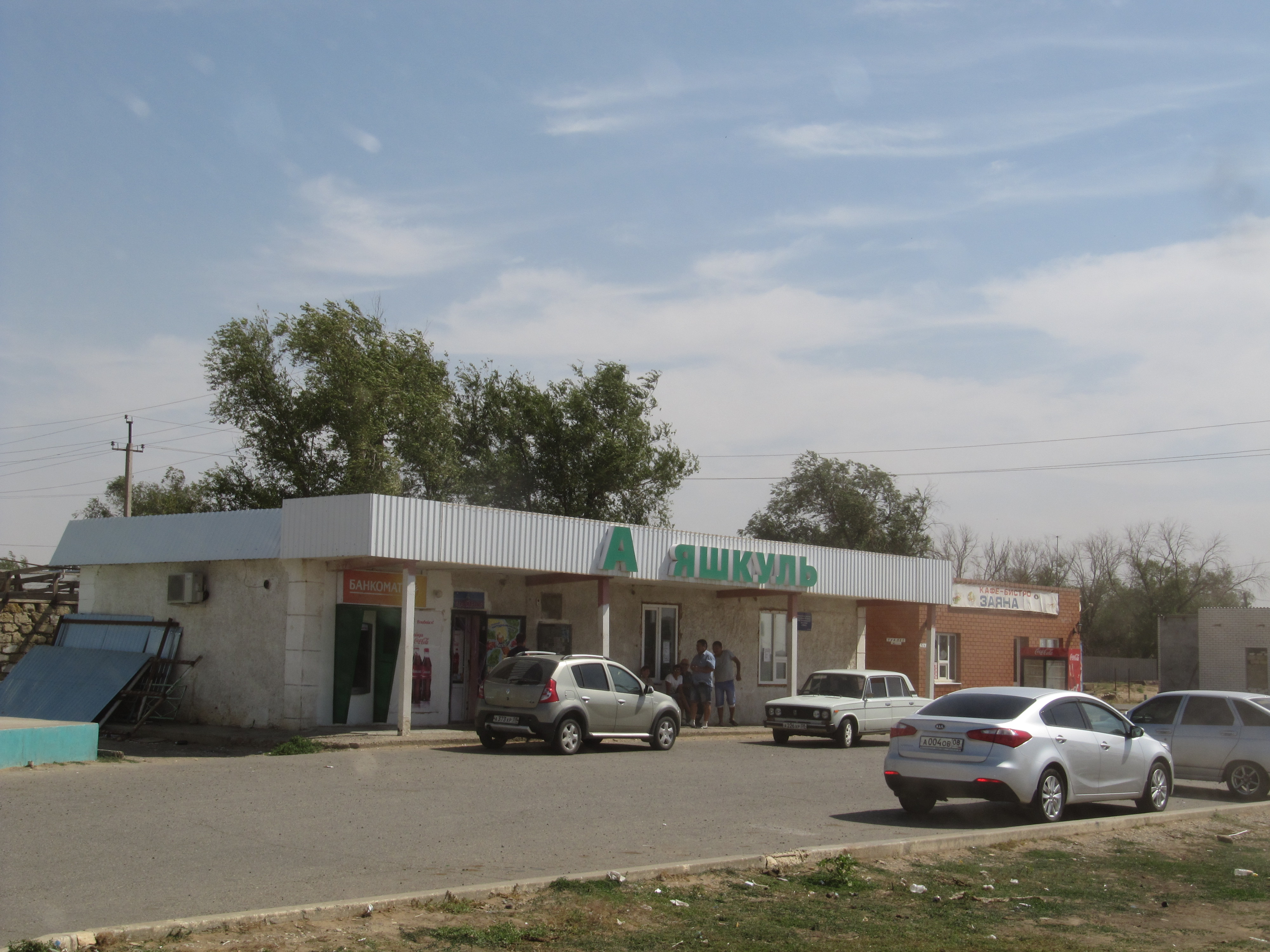 Автостанция в посёлке Яшкуль, Калмыкия